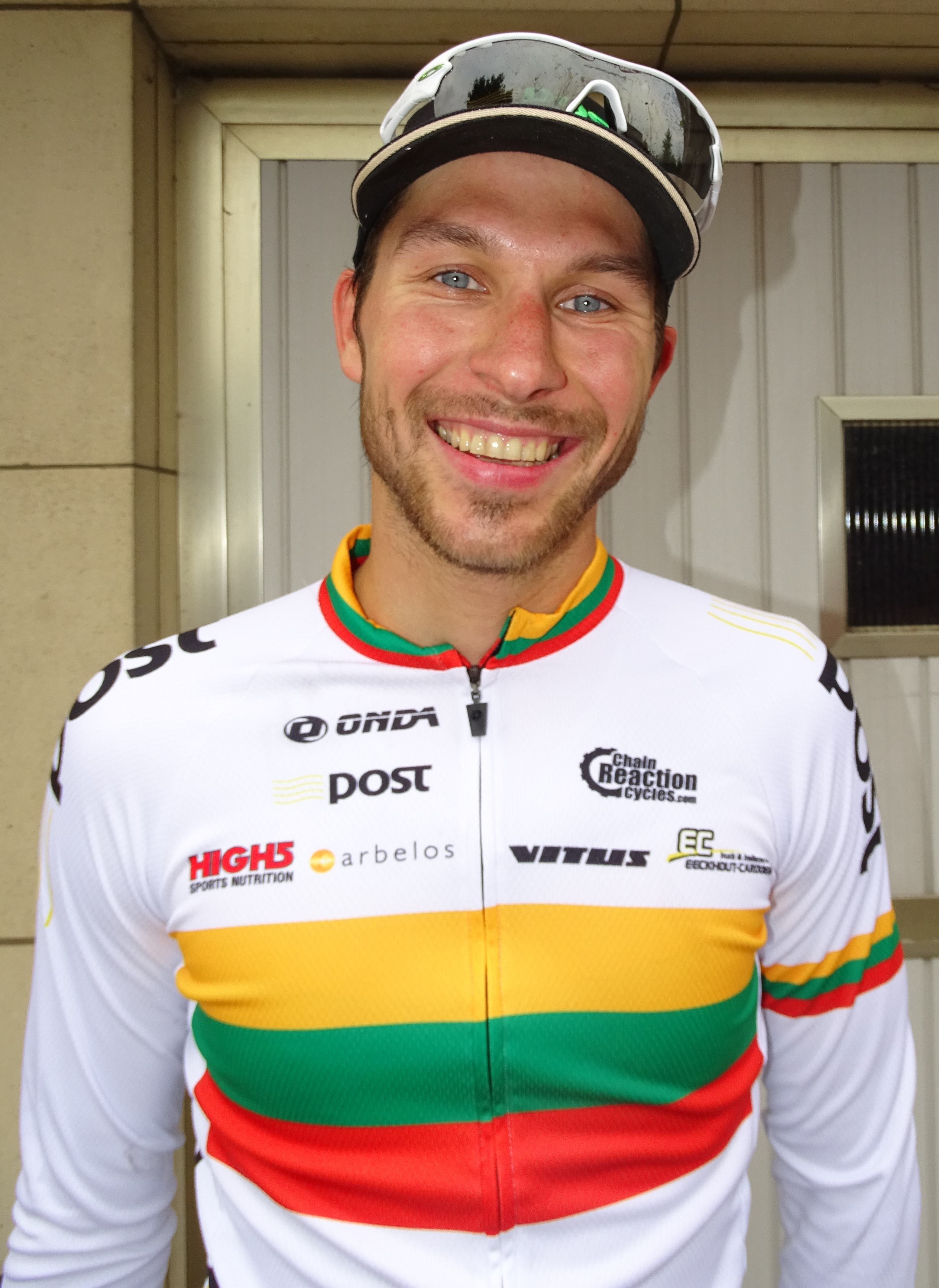 Reportage réalisé le dimanche 9 août à l'occasion de l'arrivée de la Flèche du port d'Anvers 2015 à Merksem (Anvers), Belgique.